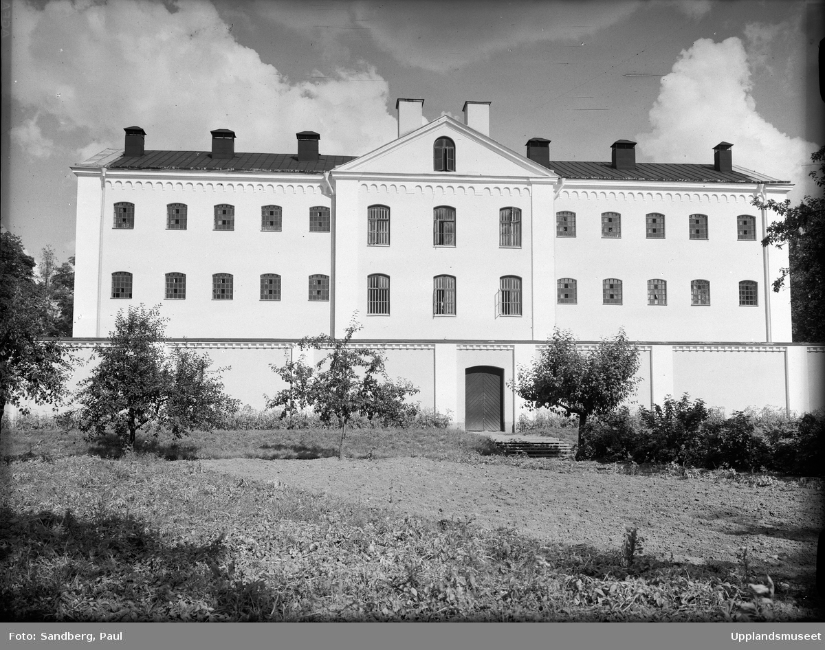 Uppsala straffängelse